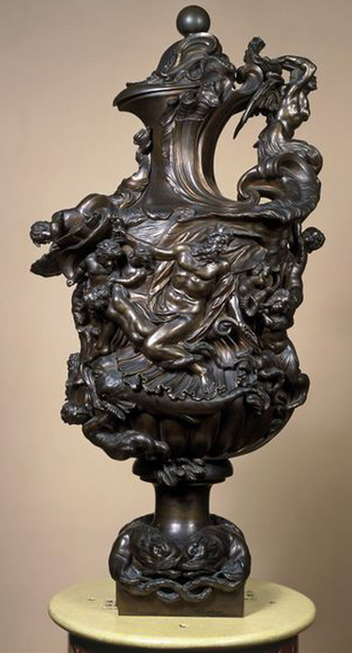 М Soldani Bronze.jpg: декоративна ваза